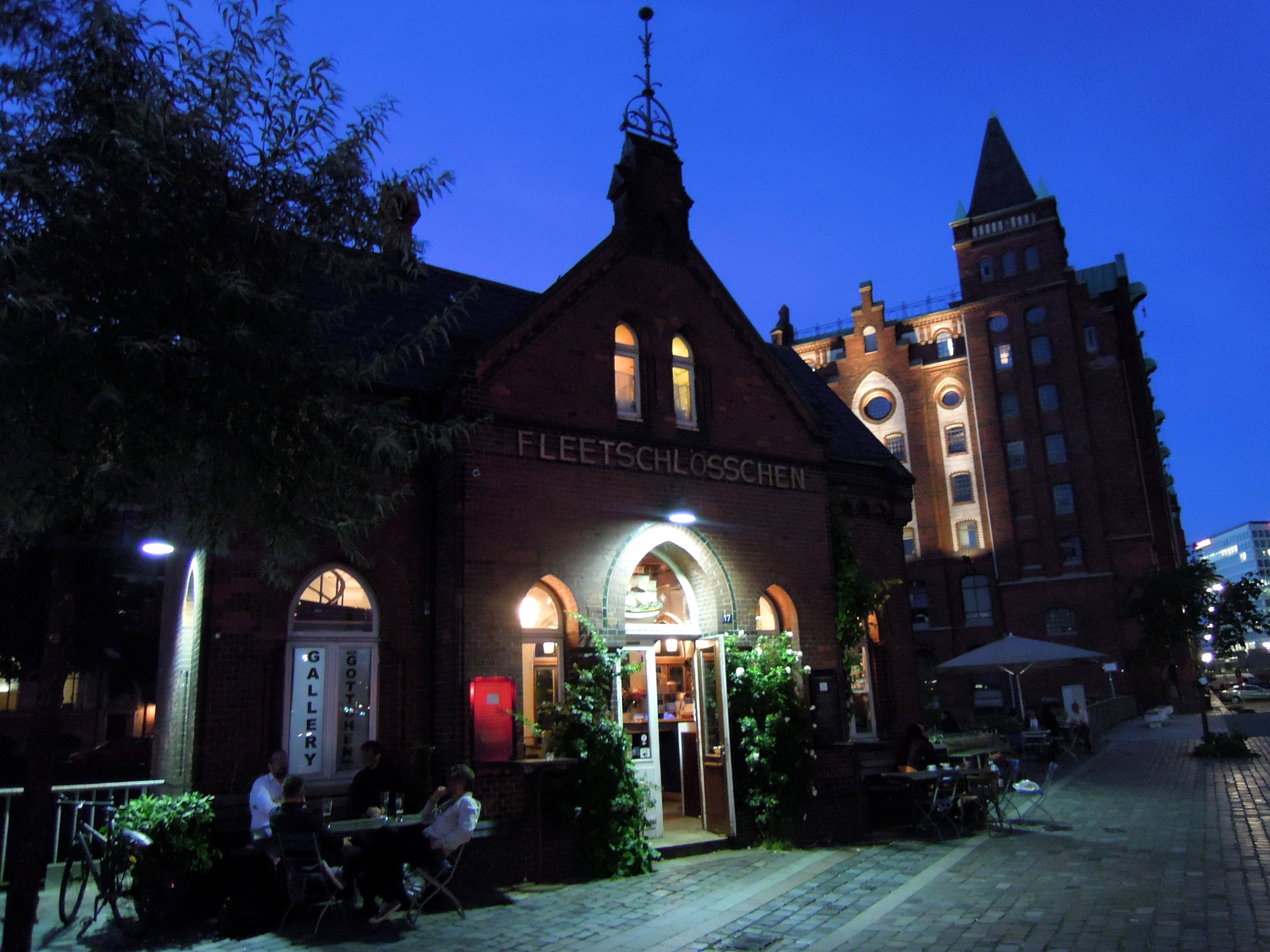 Fleetschlößchen in der Speicherstadt/ Hafencity abends mit Beleuchtung